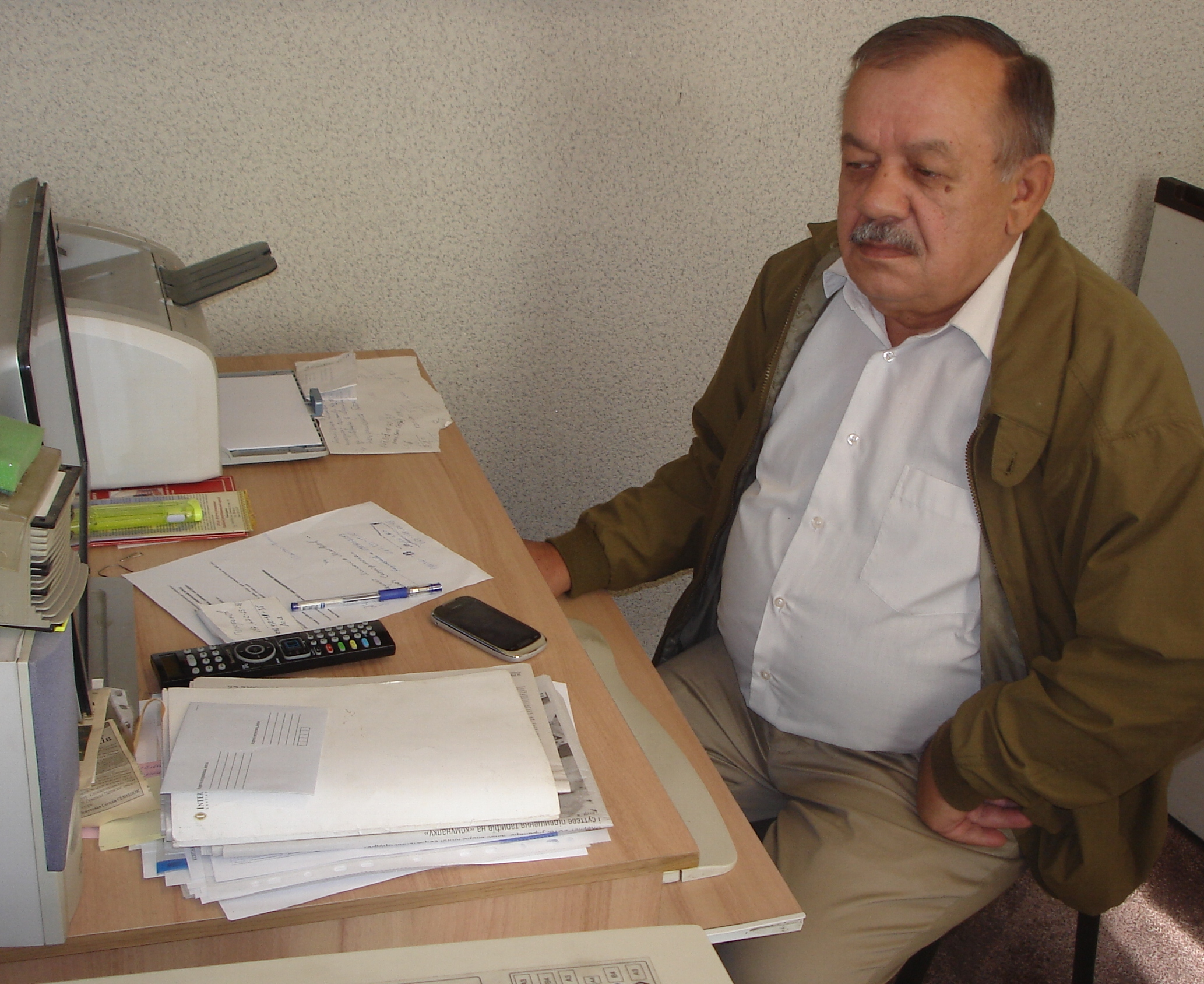 Музей_окупації2.jpg: Фотографія директора музею Круцика Р.М.